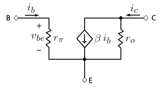 BJT NPN hybrid-pi model